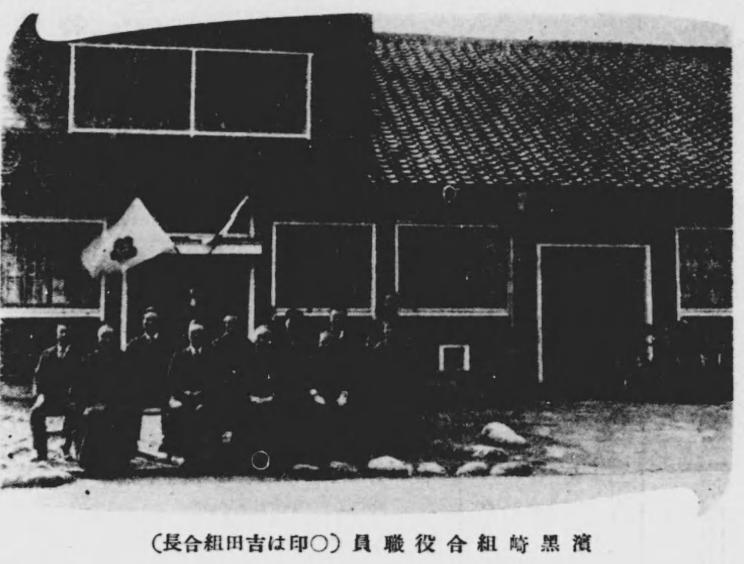 1940年（昭和15年）頃の保證責任浜黒崎信用購買販売利用組合の様子